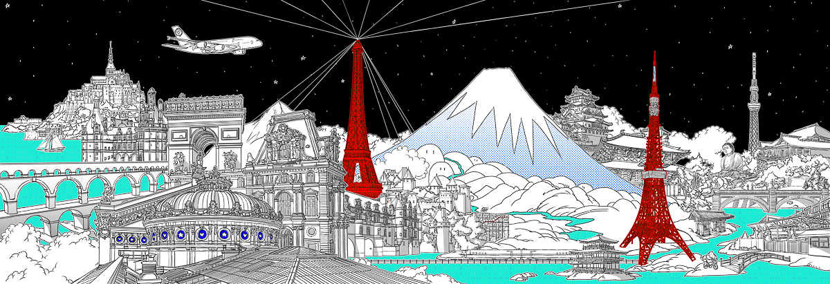 Couverture du livre des 50 ans du LFI Tokyo réalisée par Nicolas BUFFE